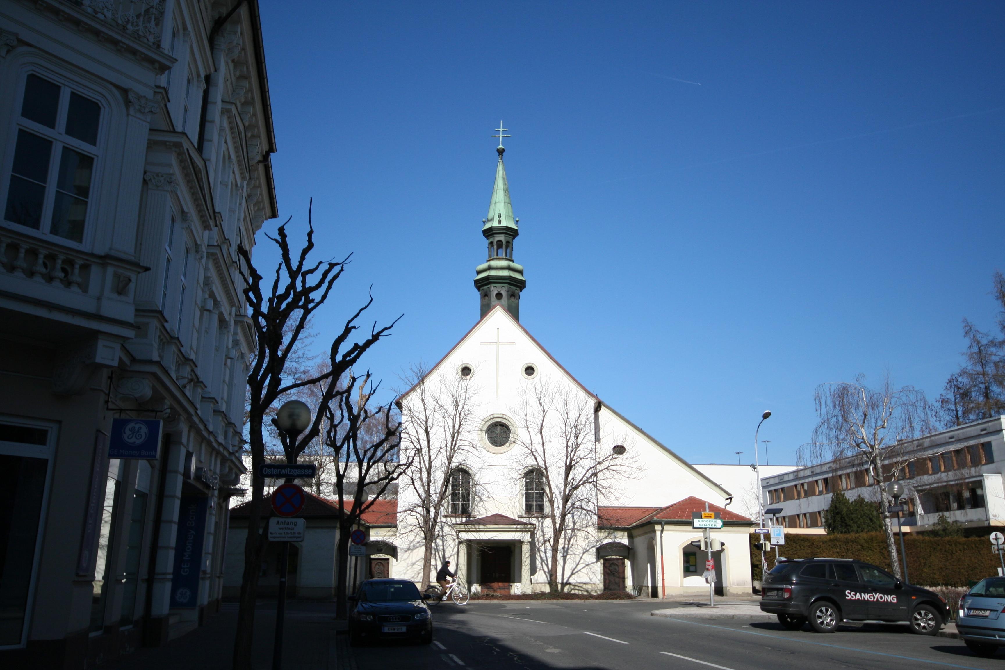 Kapuzinerkirche, Klagenfurt, Austria